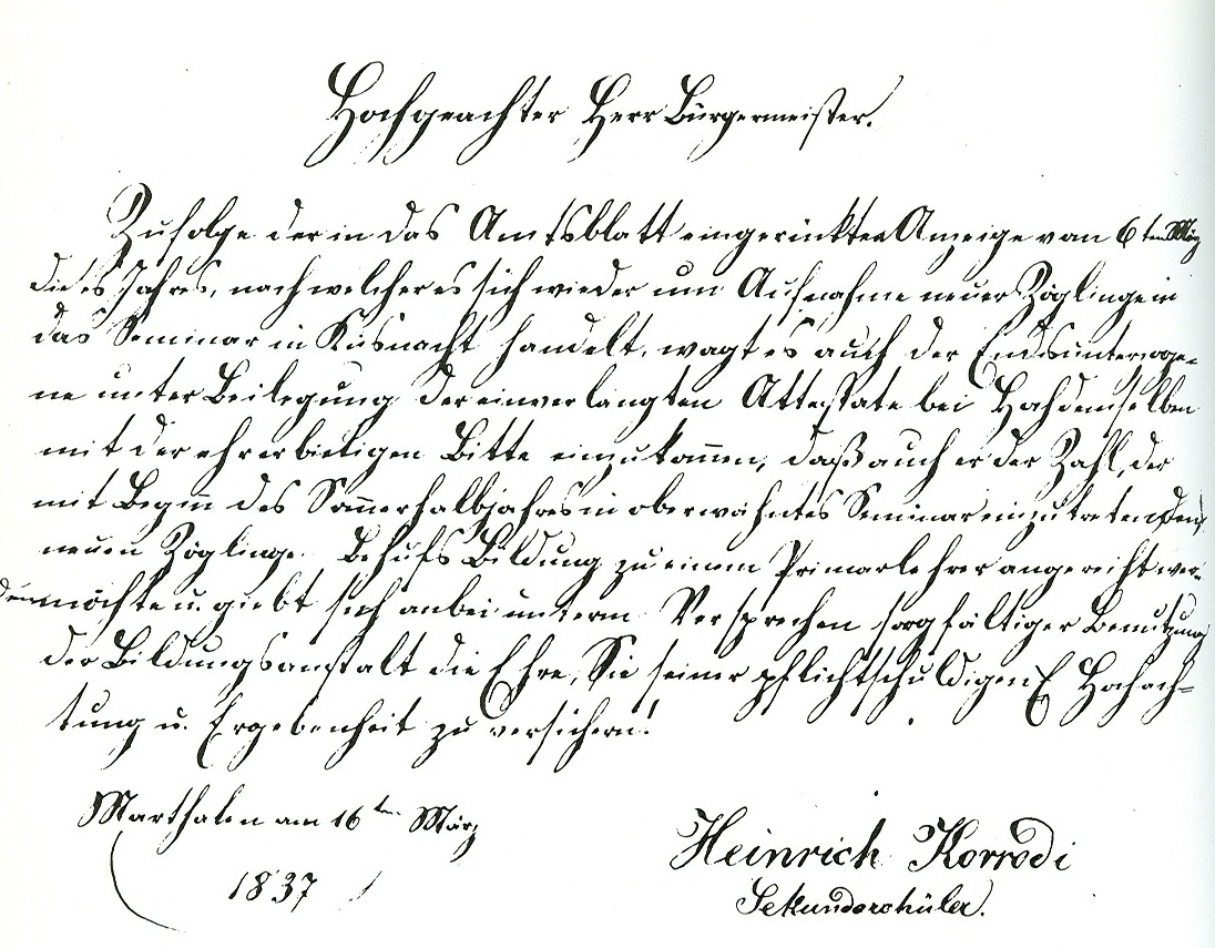 Aufnahmegesuch eines Schülers für das Seminar Küsnacht, 1837